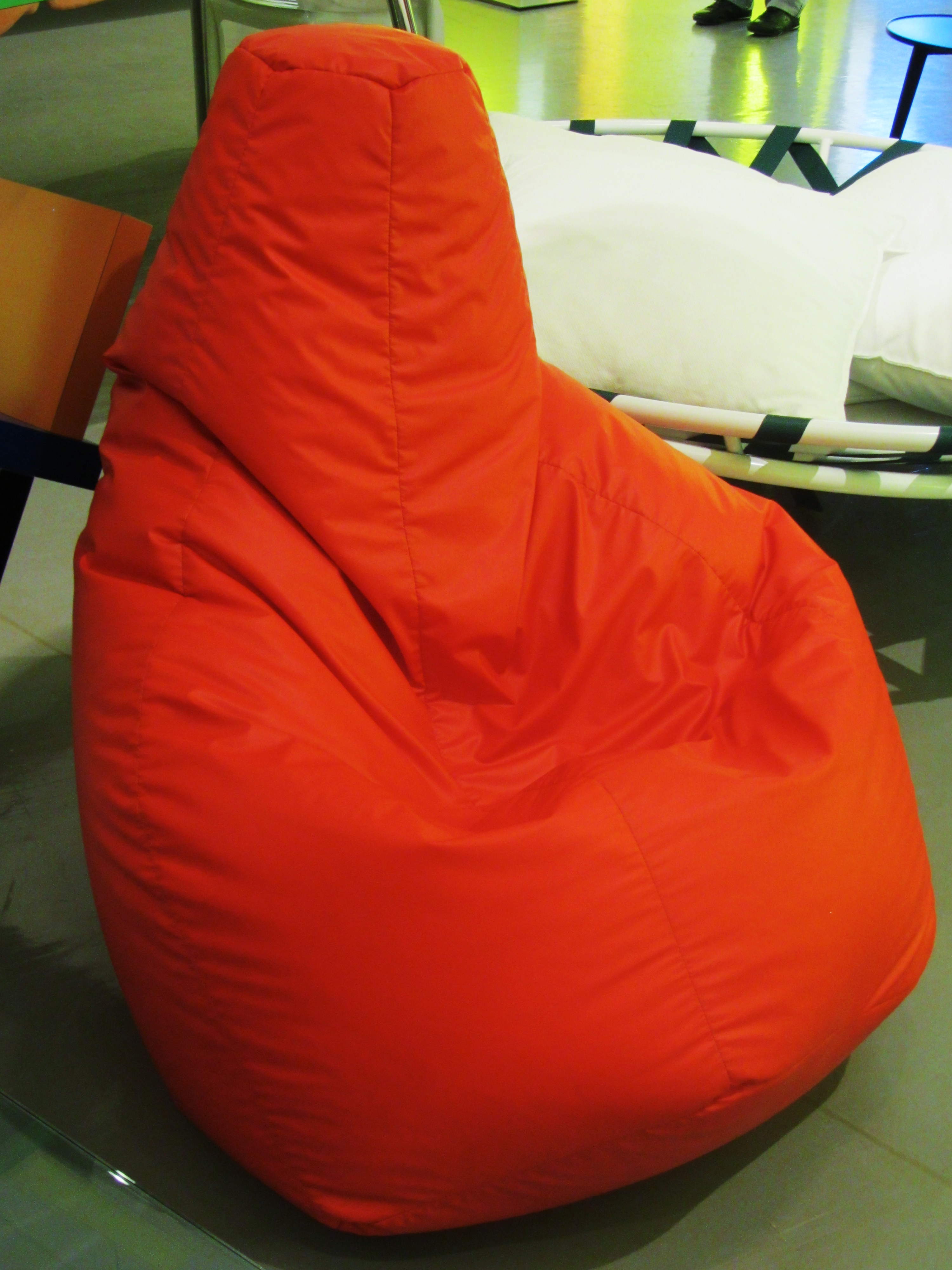 poltrona sacco zanotta